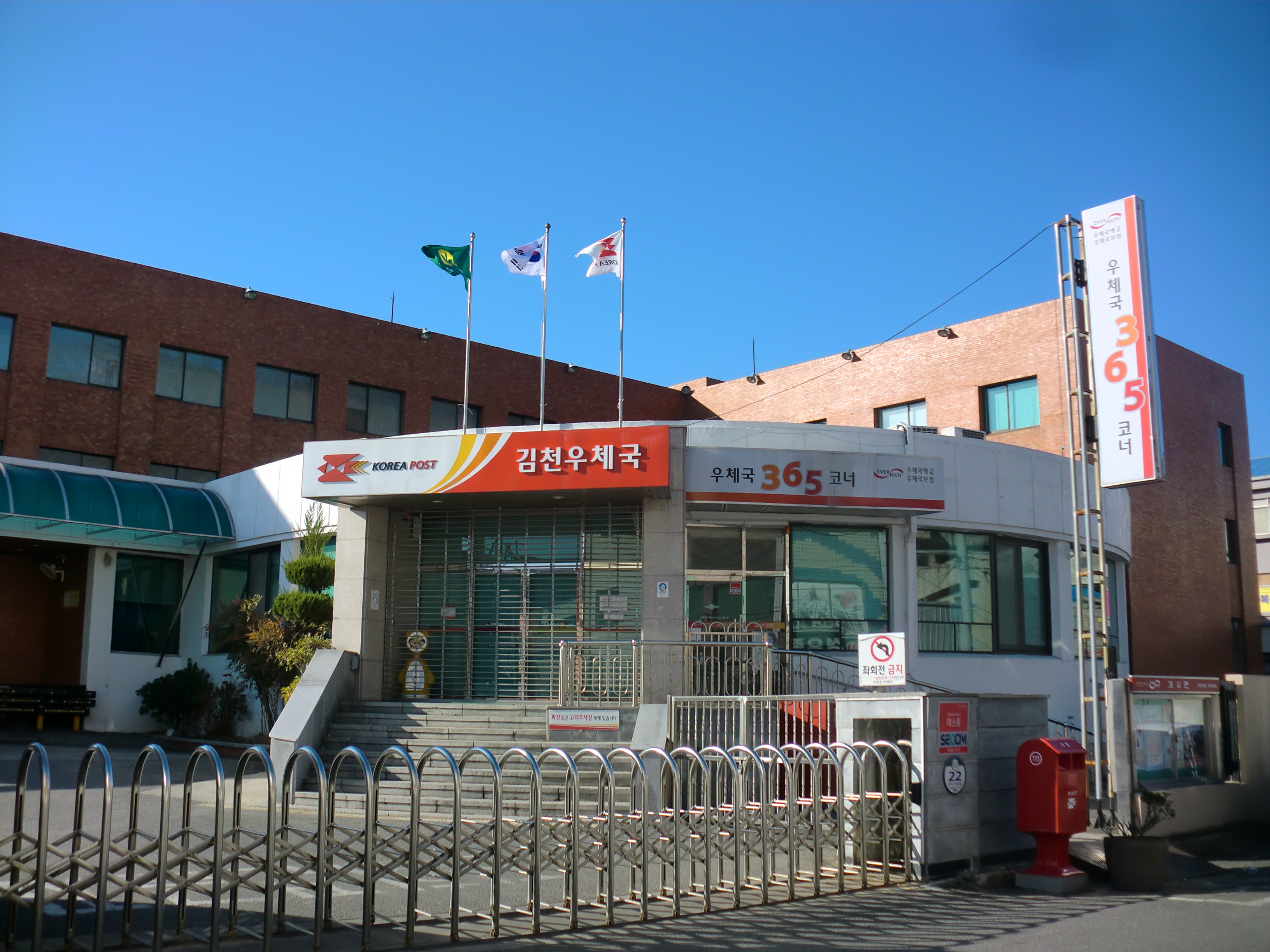 경상북도 김천시에 있는 김천우체국